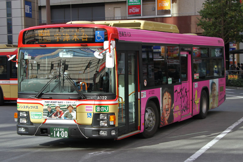 Nishi Tokyo Bus car (Funky Monkey Babys Bus ) 西東京バスの車両（ファンモンバス＜ピンク＞）